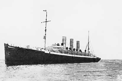 Вспомогательный крейсер Урал